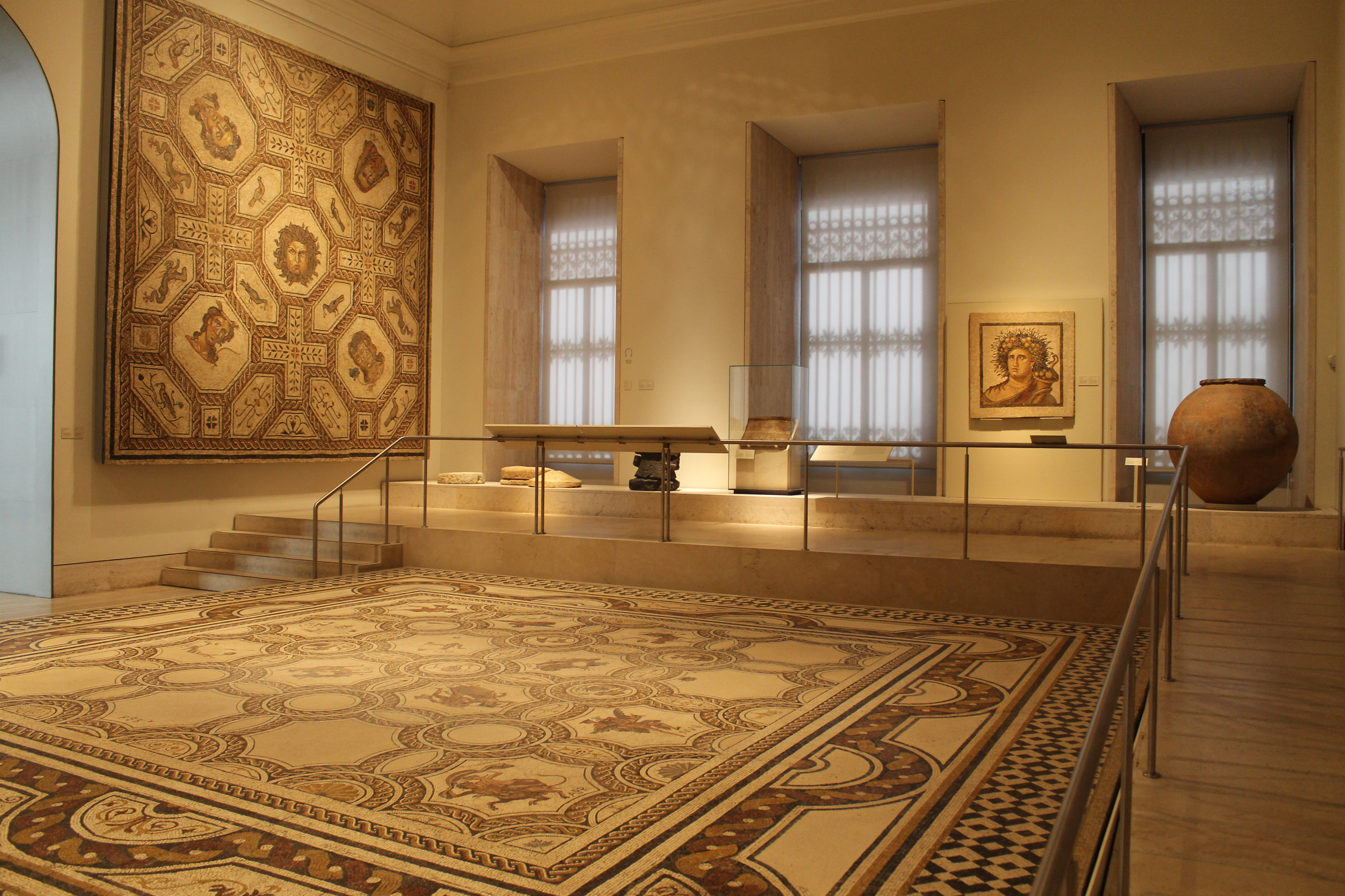 Mosaicos romanos